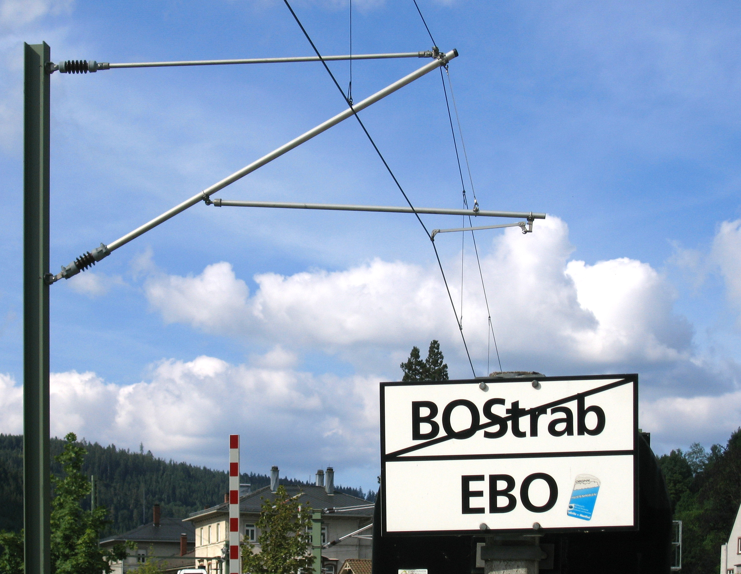 Hinweisschild für den Übergang vom Straßenbahn- zum Eisenbahnbetrieb mit Werbung für Original Hustenperlen; Bad Wildbad